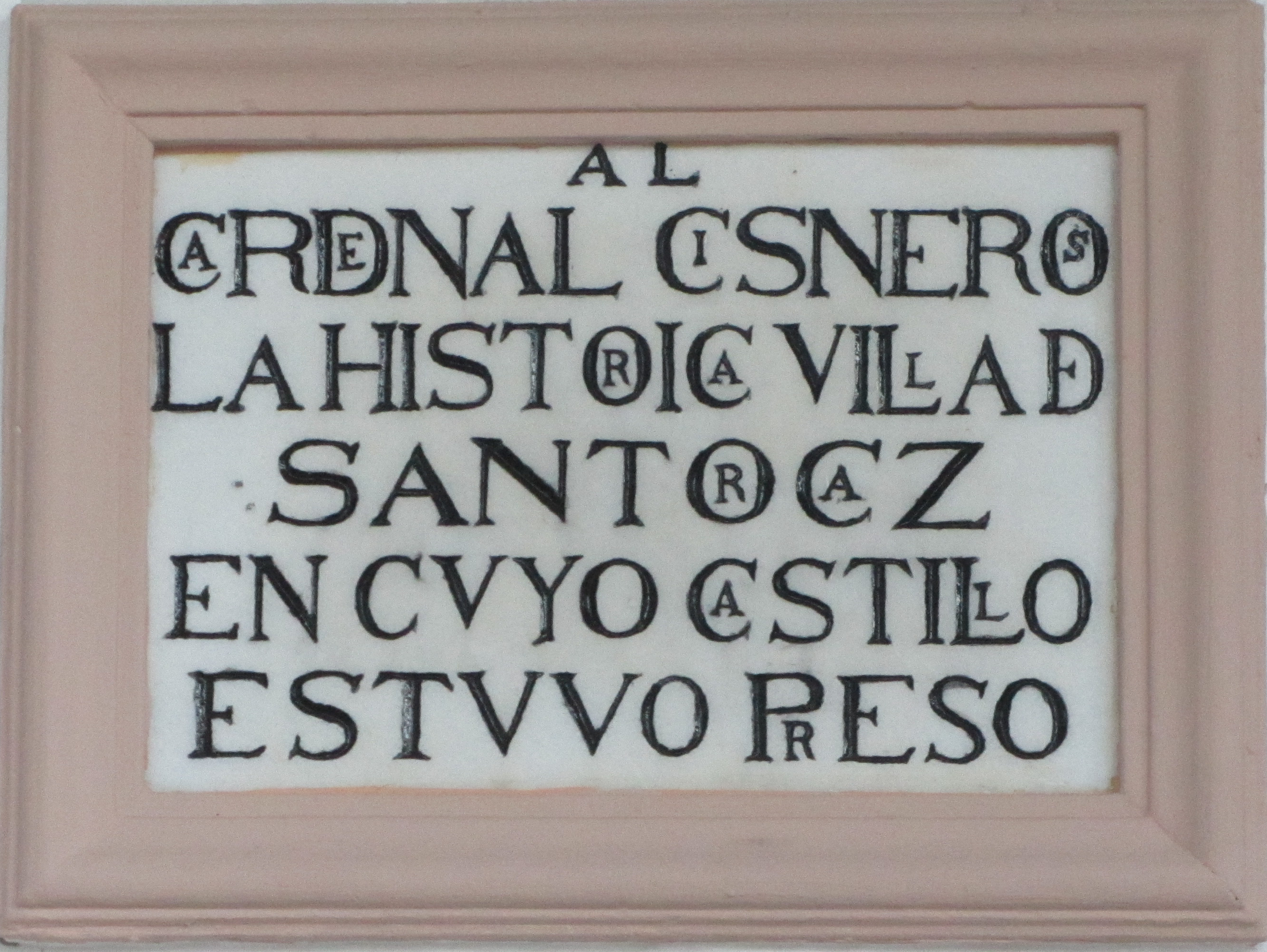 Lápida en recuerdo del encarcelamiento del Cardenal Cisneros en el Castillo de Torremocha de Santorcaz (Comunidad de Madrid - España). Texto: "Al Cardenal Cisneros. La histórica villa de Santorcaz, en cuyo castillo estuvo preso".